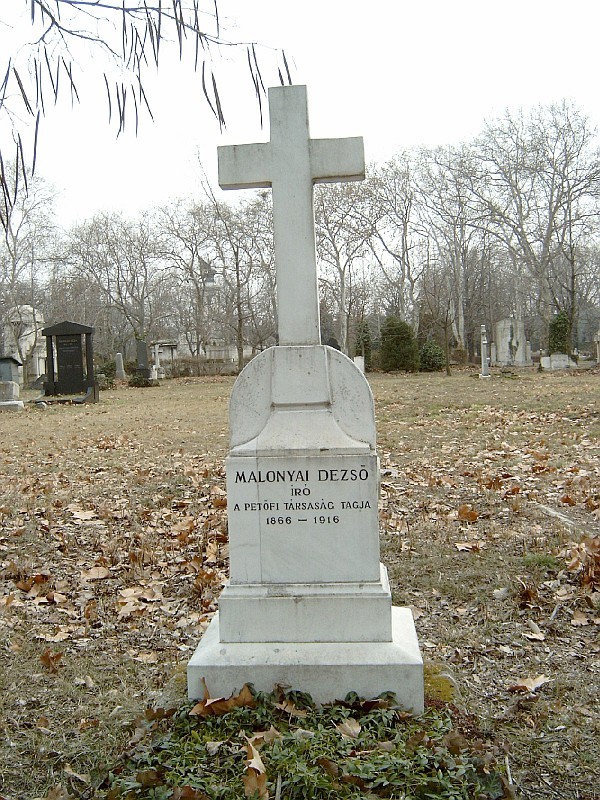 Malonyai Dezső sírja Budapesten. Kerepesi temető: 20-1-19.